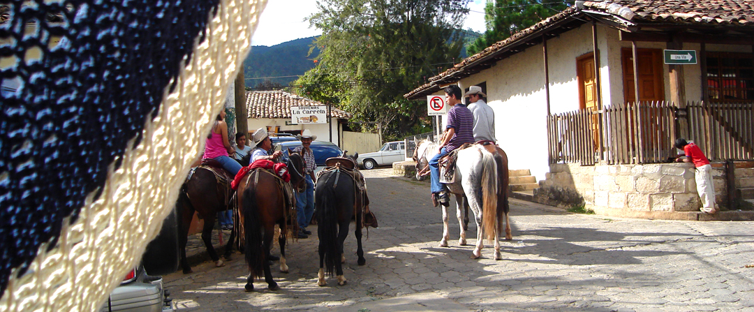 paseando por valle angeles